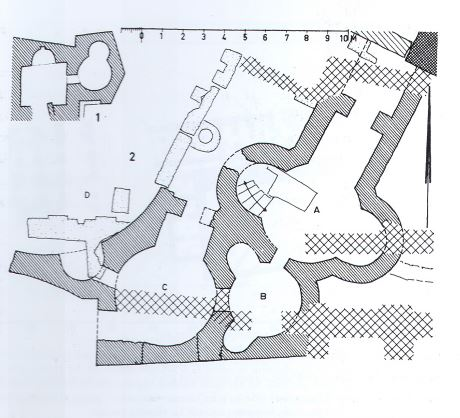 Özel bir hamam (solda) ve Kalenderhane Camii'nin bitişiğinde ortaya çıkarılan Çifte Hamam (x biçiminde taranmış olan bölüm,sonradan yapılan ekler).Planın ölçeği 1:2000'dir.